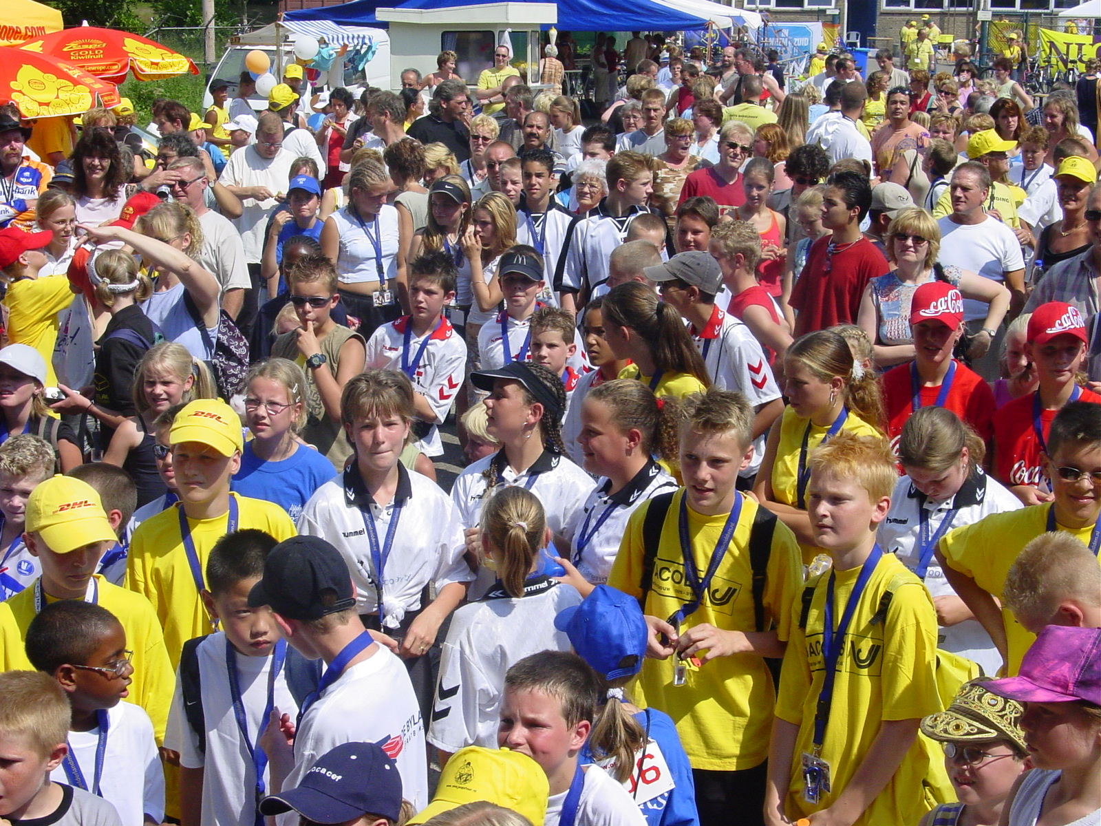 Ome Joops Tour 2003 - Verzamelen sporthal Bakenhof Arnhem